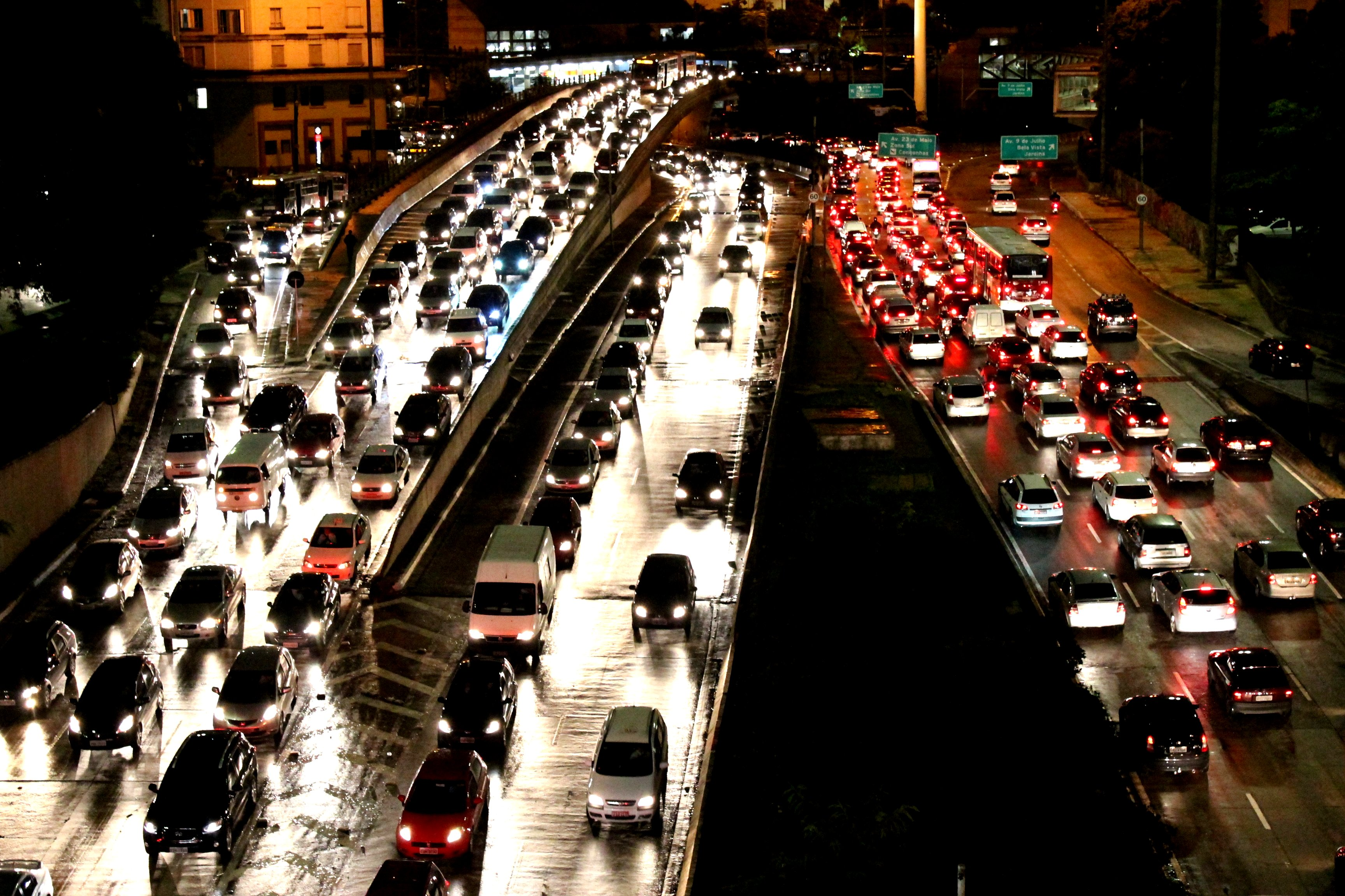 Congestionamento no Vale do Anhagabaú